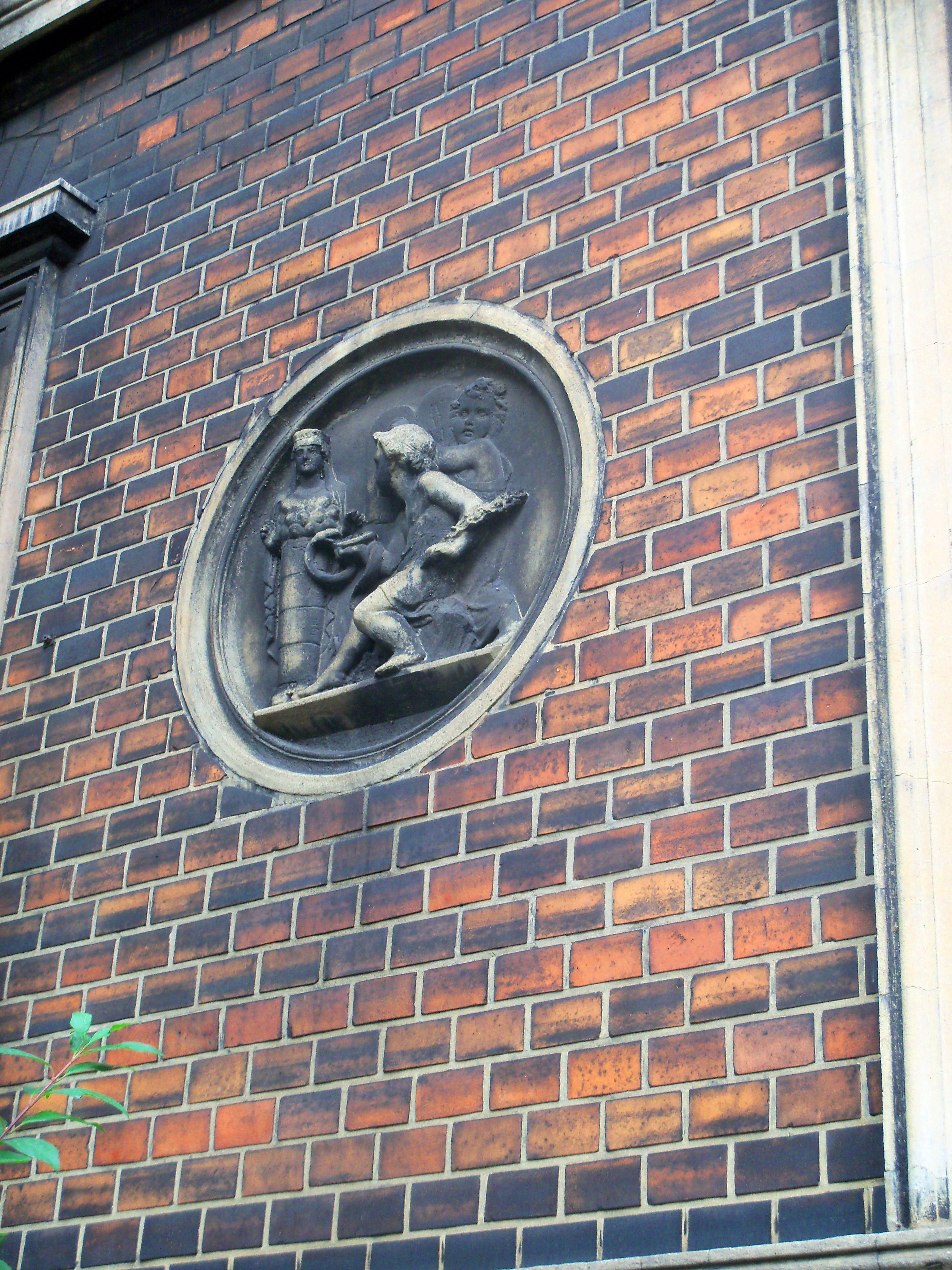 Katowice-Szopienice: ulica ks. bpa Herberta Bednorza - budynek pod numerem 16